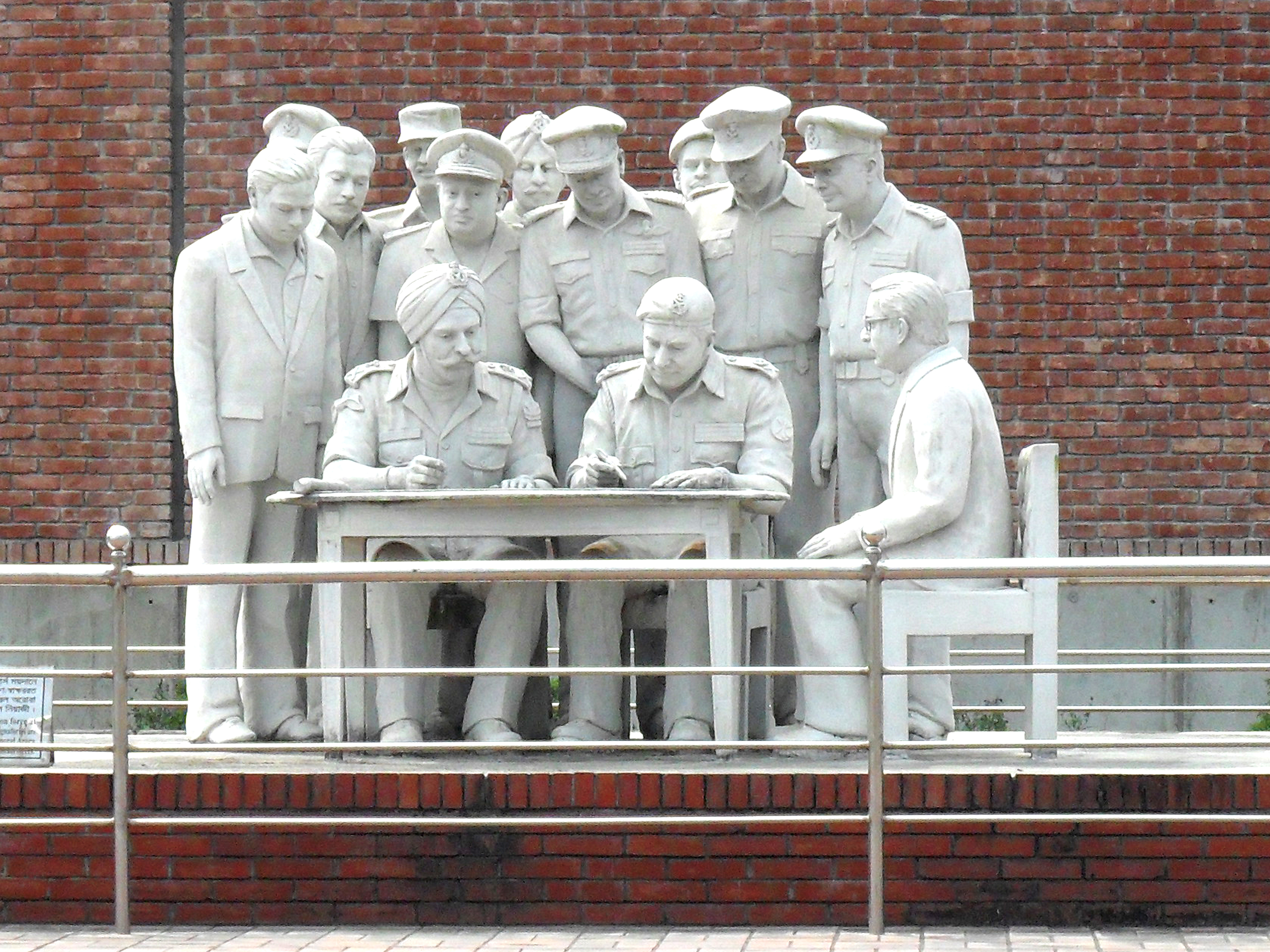 মুজিবনগর মুক্তিযুদ্ধ স্মৃতি কমপ্লেক্স